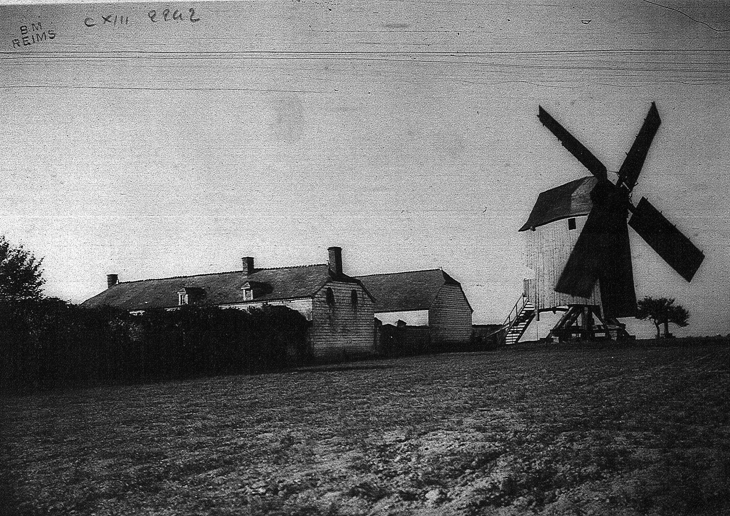 vue de Courcy.